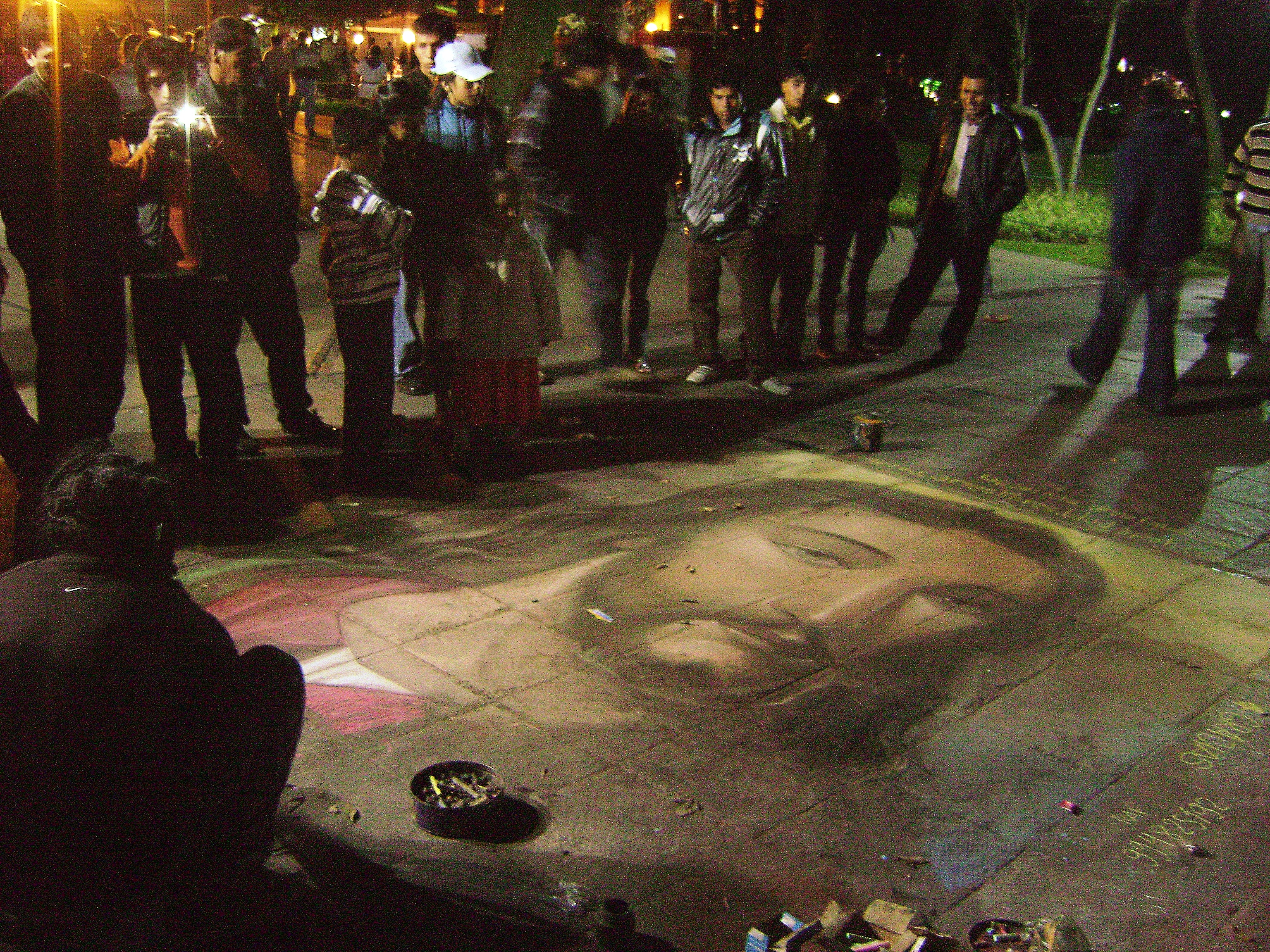 Dibujo de Jesucristo, en acuarela. Parque de la Exposición. Lima, Perú.